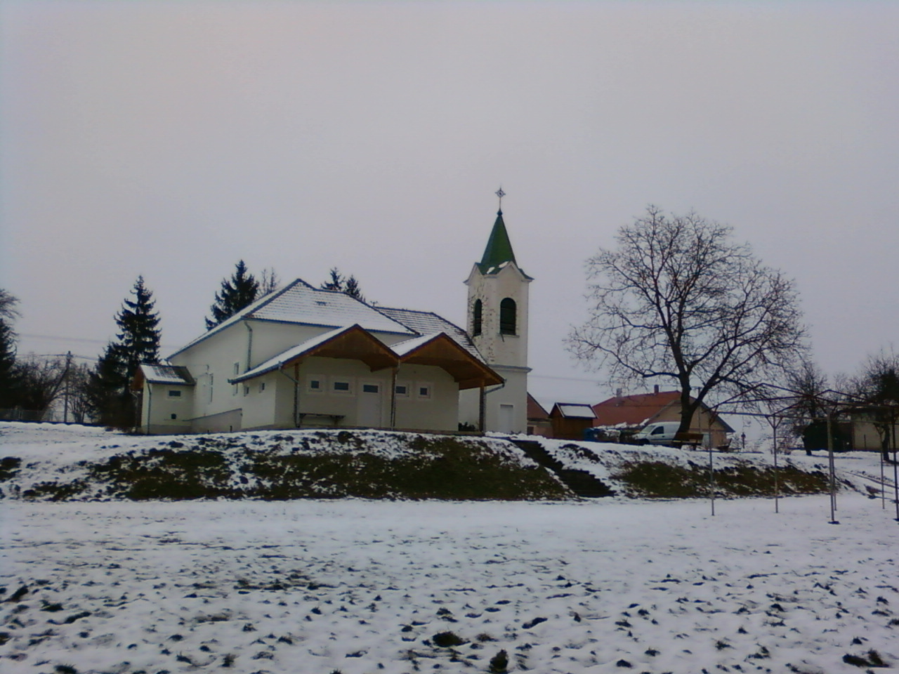 A kerecsenyi római katolikus templom, Zala megye, Magyarország